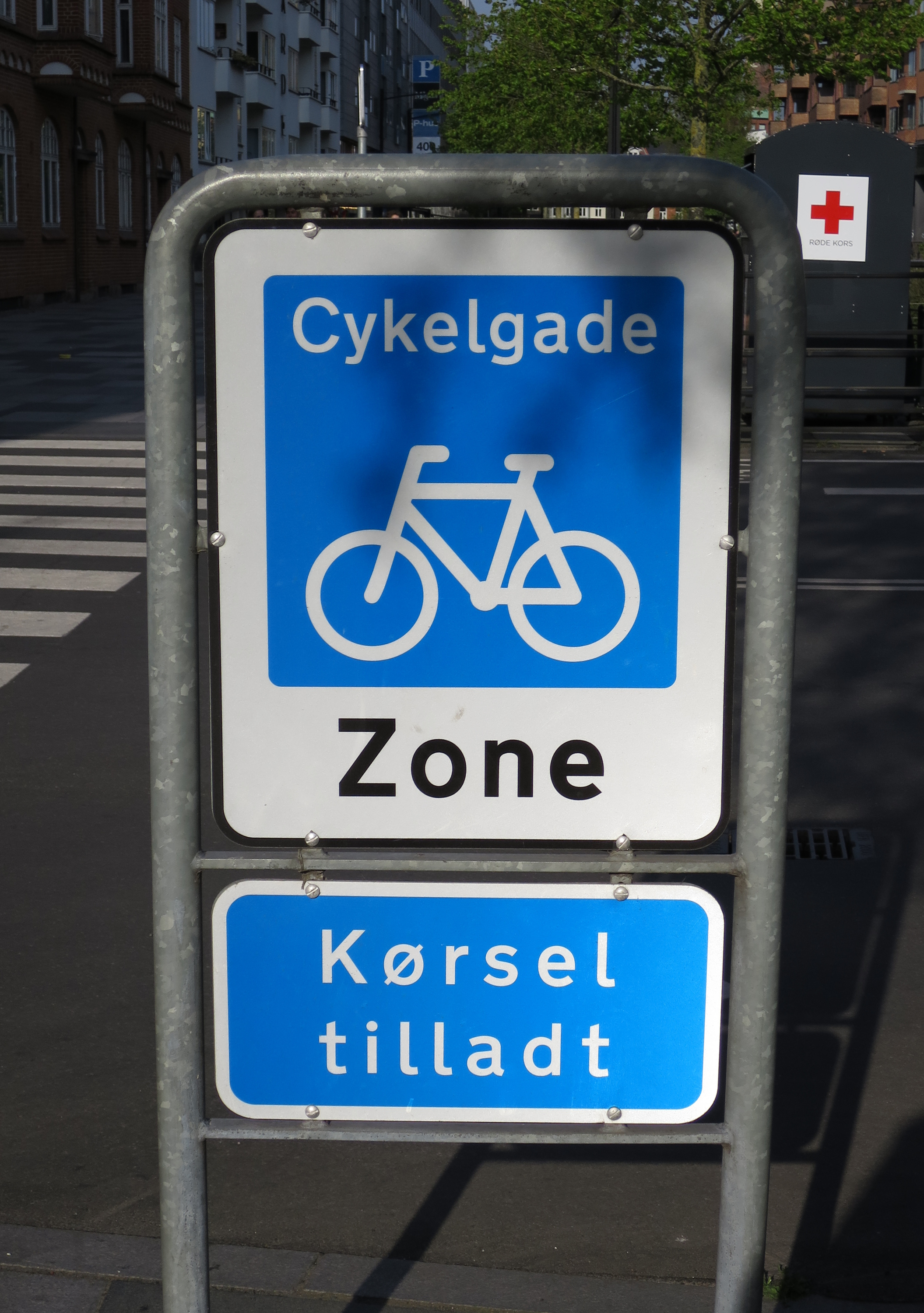 Skiltning af cykelgade - en vej hvor cyklister har fortrinsret.